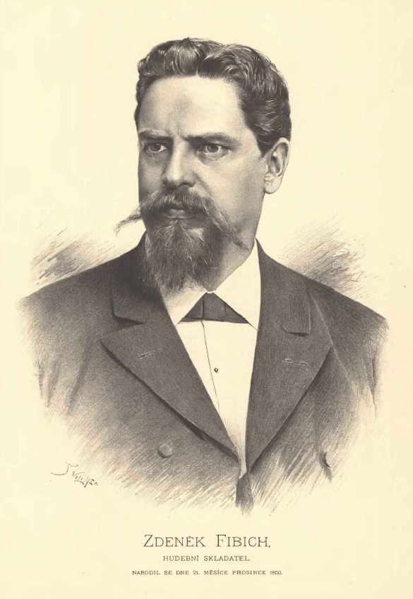 Portréty českých osobností od Jana Vilímka